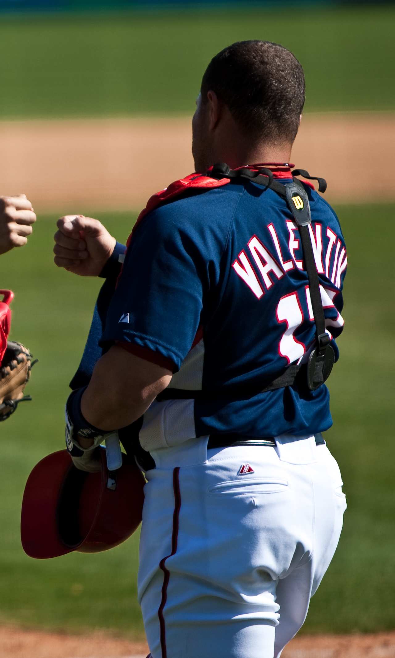 Javier Valentín